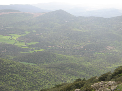 Fotografía Comarca del Jiloca